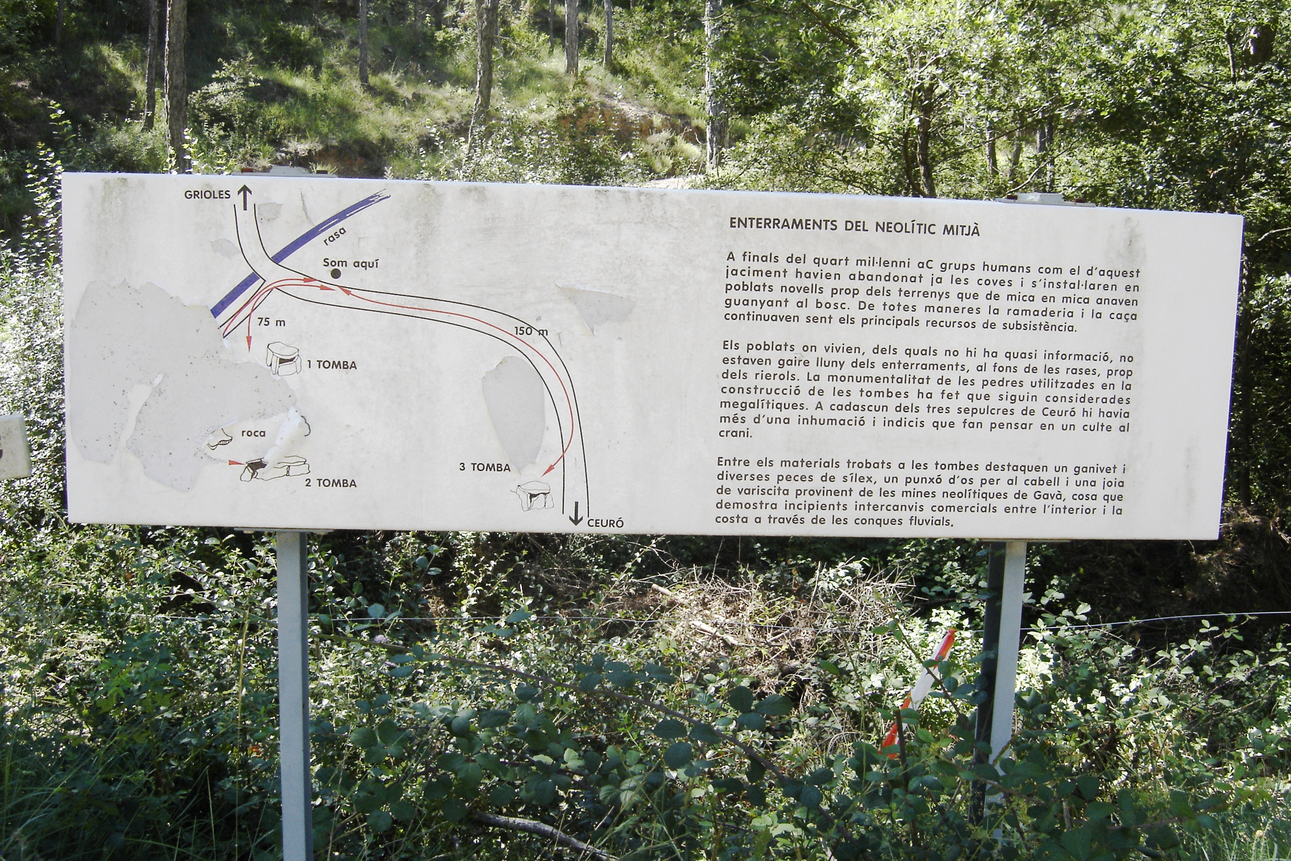 Cartell informatiu que hi ha a la Necrópolis de Ceuró (Castellar de la Ribera, Solsonès)